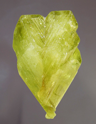 Chrysoberyl, Brazil